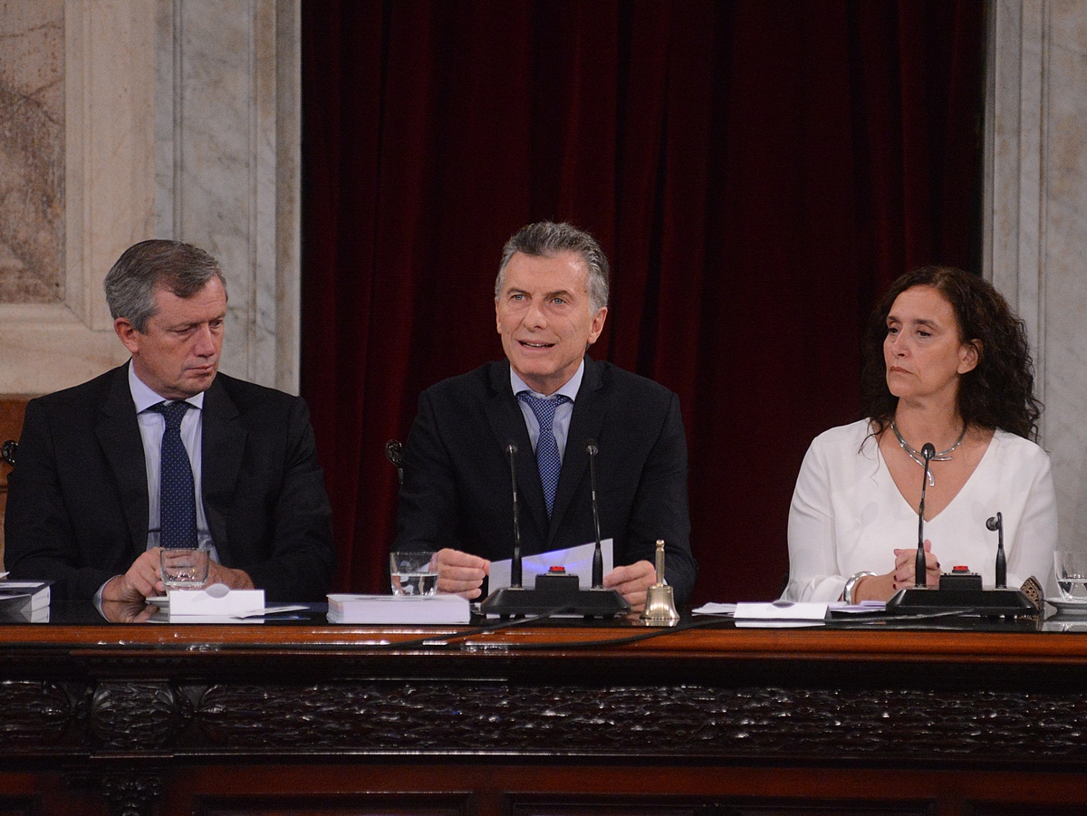 AQUÍ SE PUBLICA UNA VERSIÓN ÍNTEGRA DEL DISCURSO PRONUNCIADO POR EL PRIMER MANDATARIO ANTE DIPUTADOS Y SENADORES